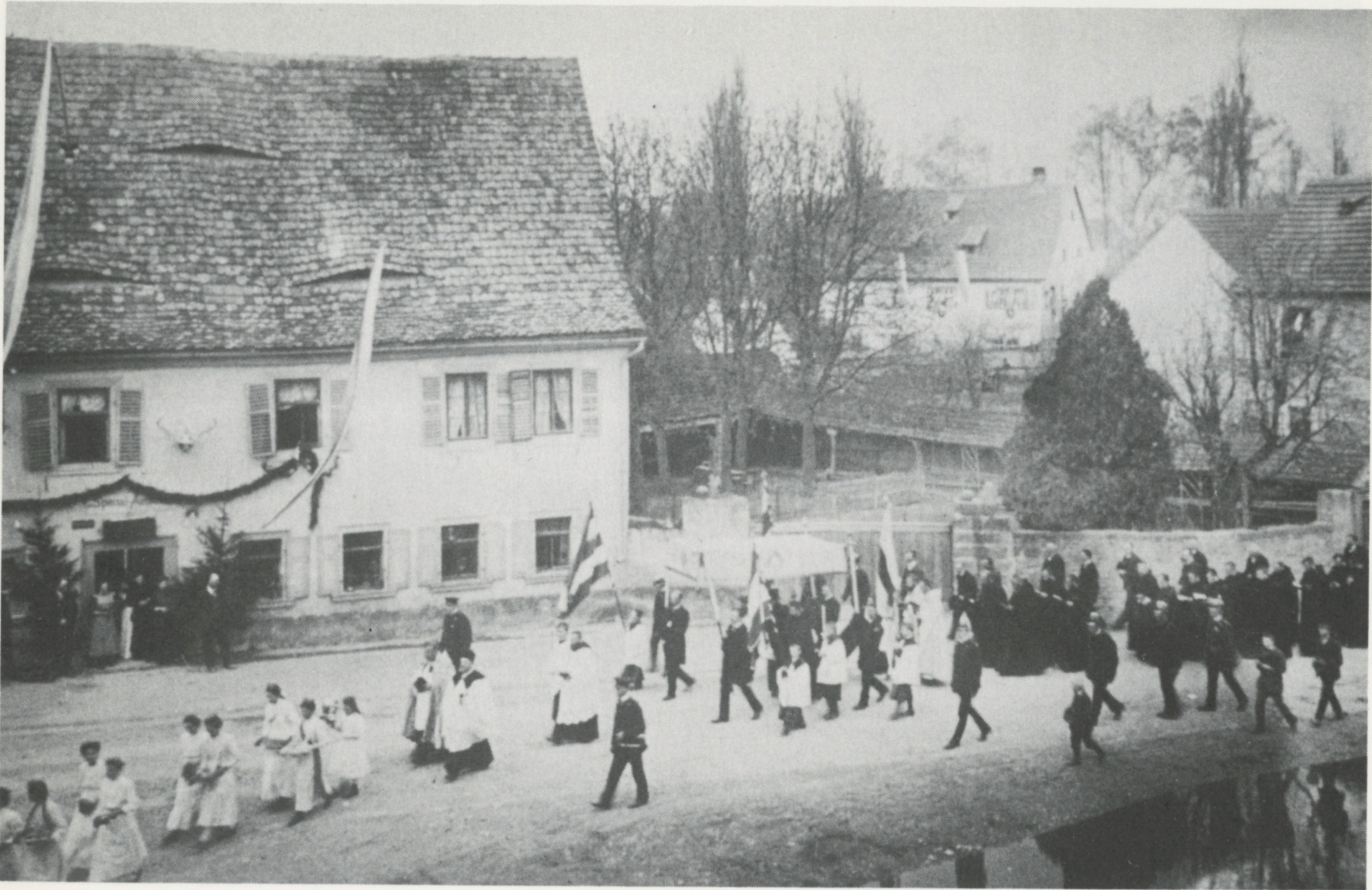 Fotografie von 1914. Einzug der Benediktiner in die alten Klostergebäude in Münsterschwarzach am 14. April 1914